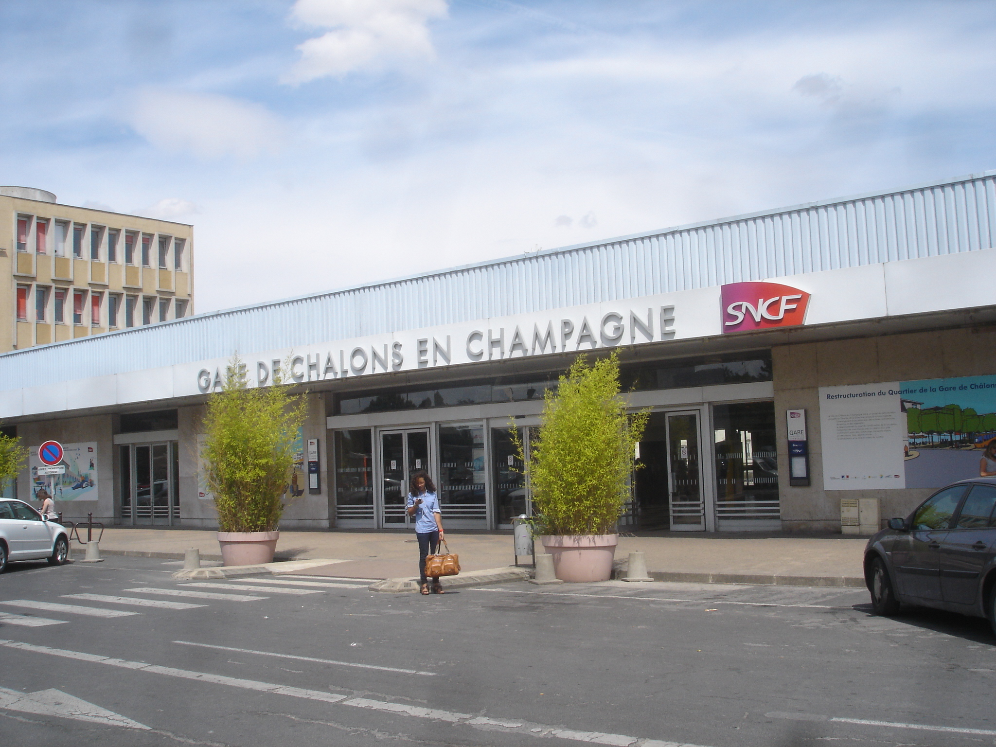 Bâtiment voyageurs